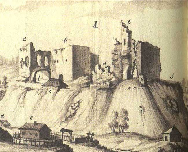 Piltsuurendus Brotze plaanist.